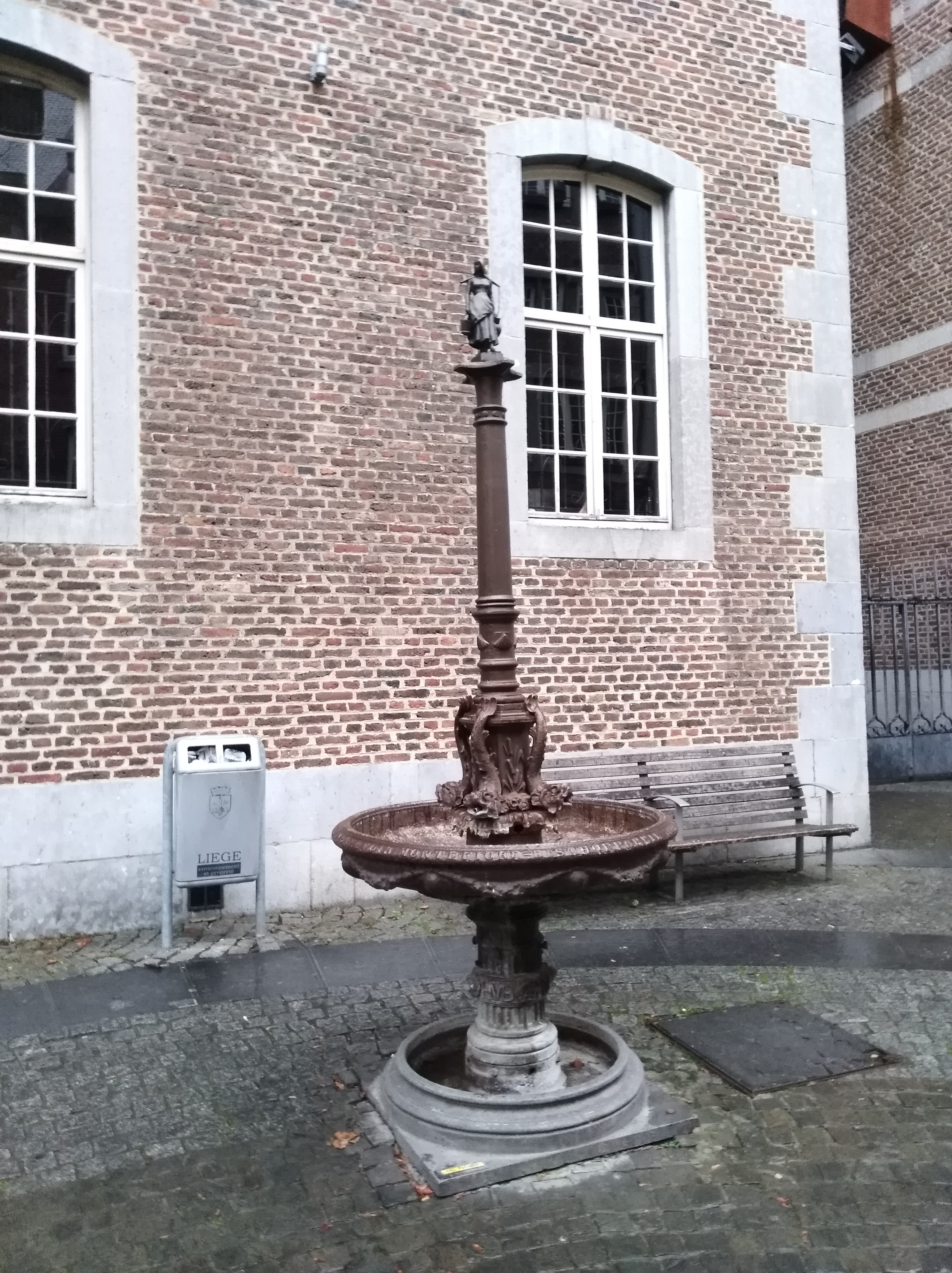 Fontaine Montefiore de la rue Sur-les-Foulons